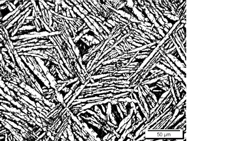 Esta micrografia foi tirada durante minhas pesquisas de mestrado na Universidade Estadual Paulista